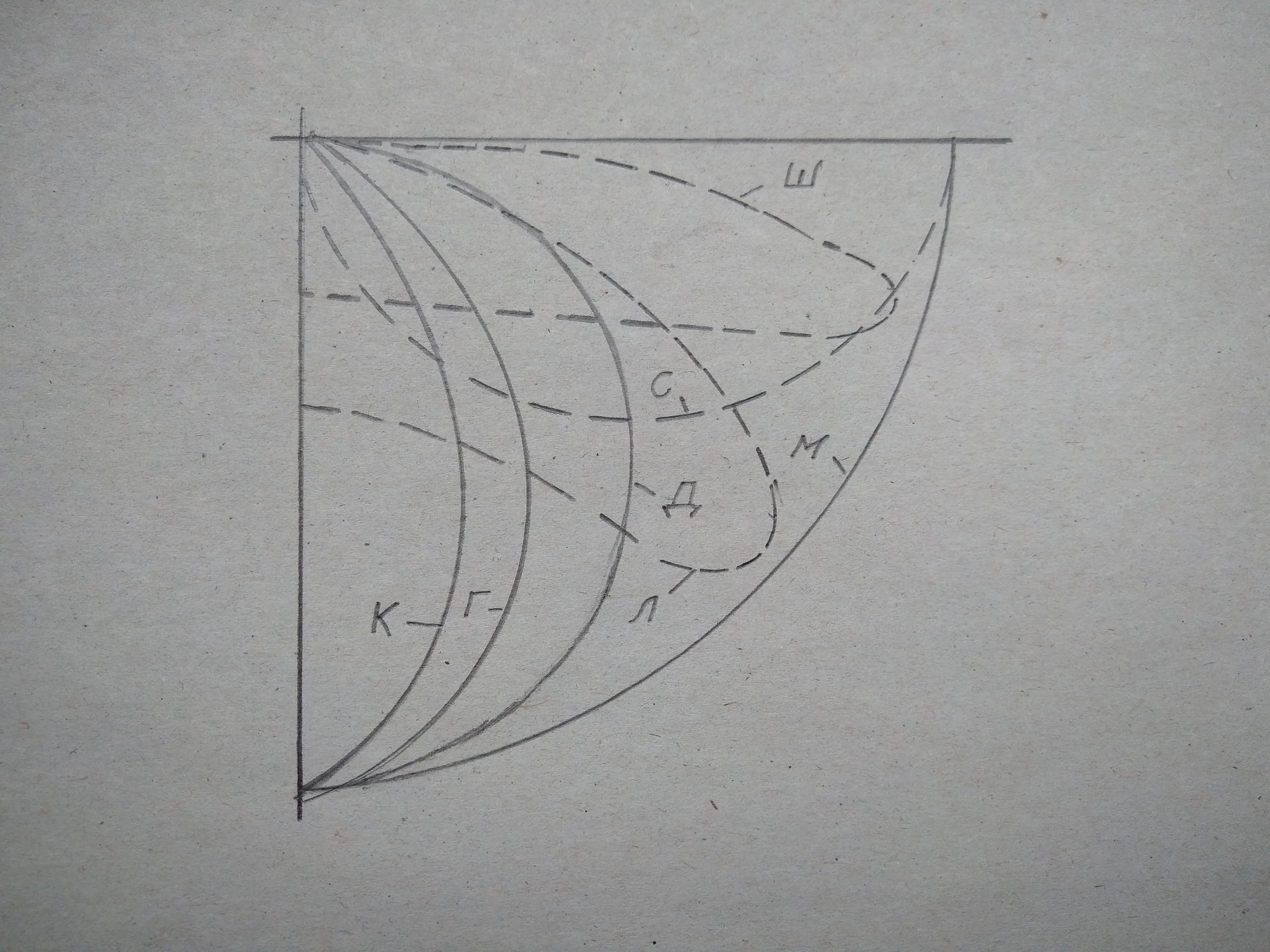 Намальовано олівцем